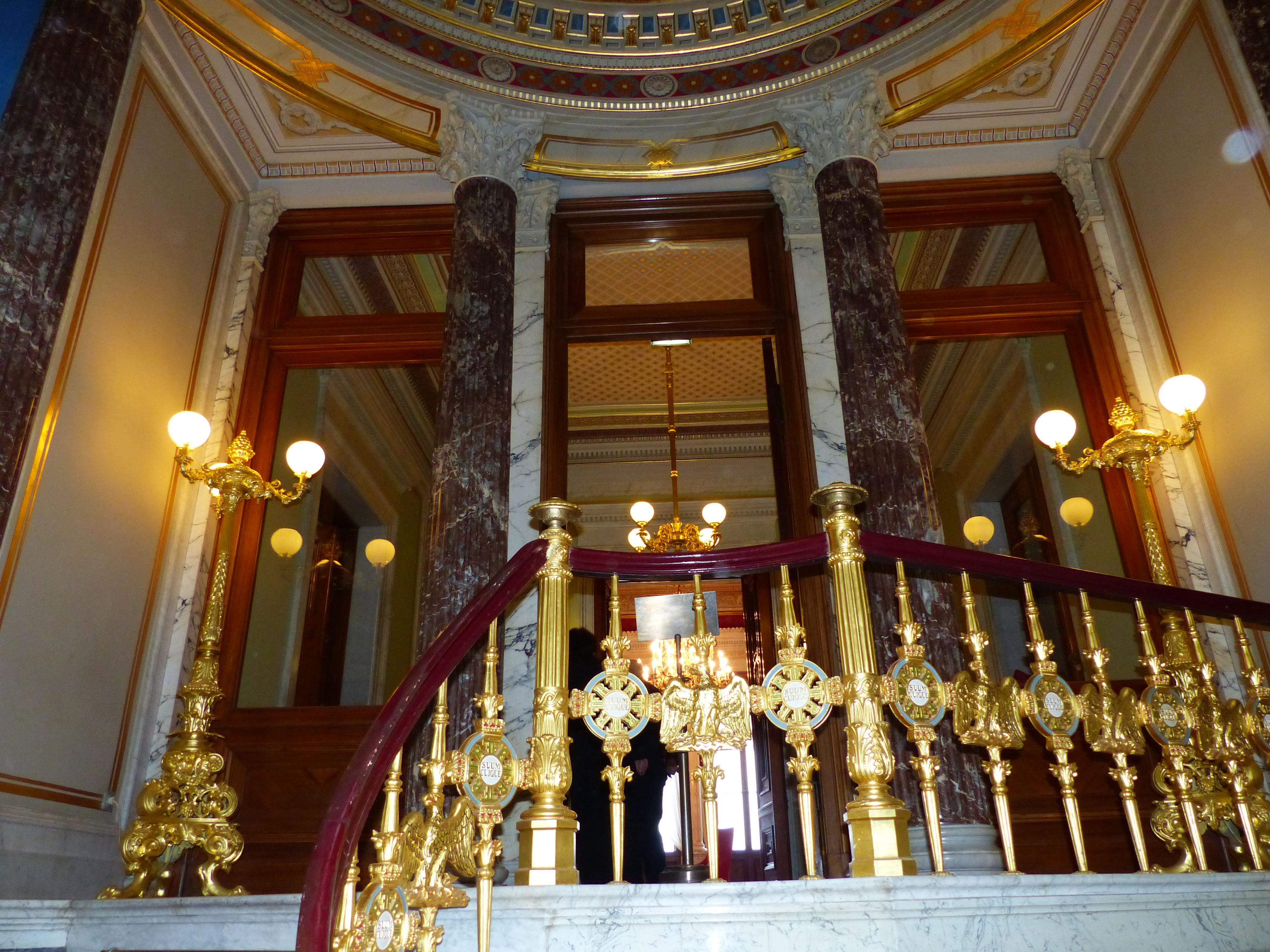 Schloss Albrechtsberg, Dresden, Sachsen